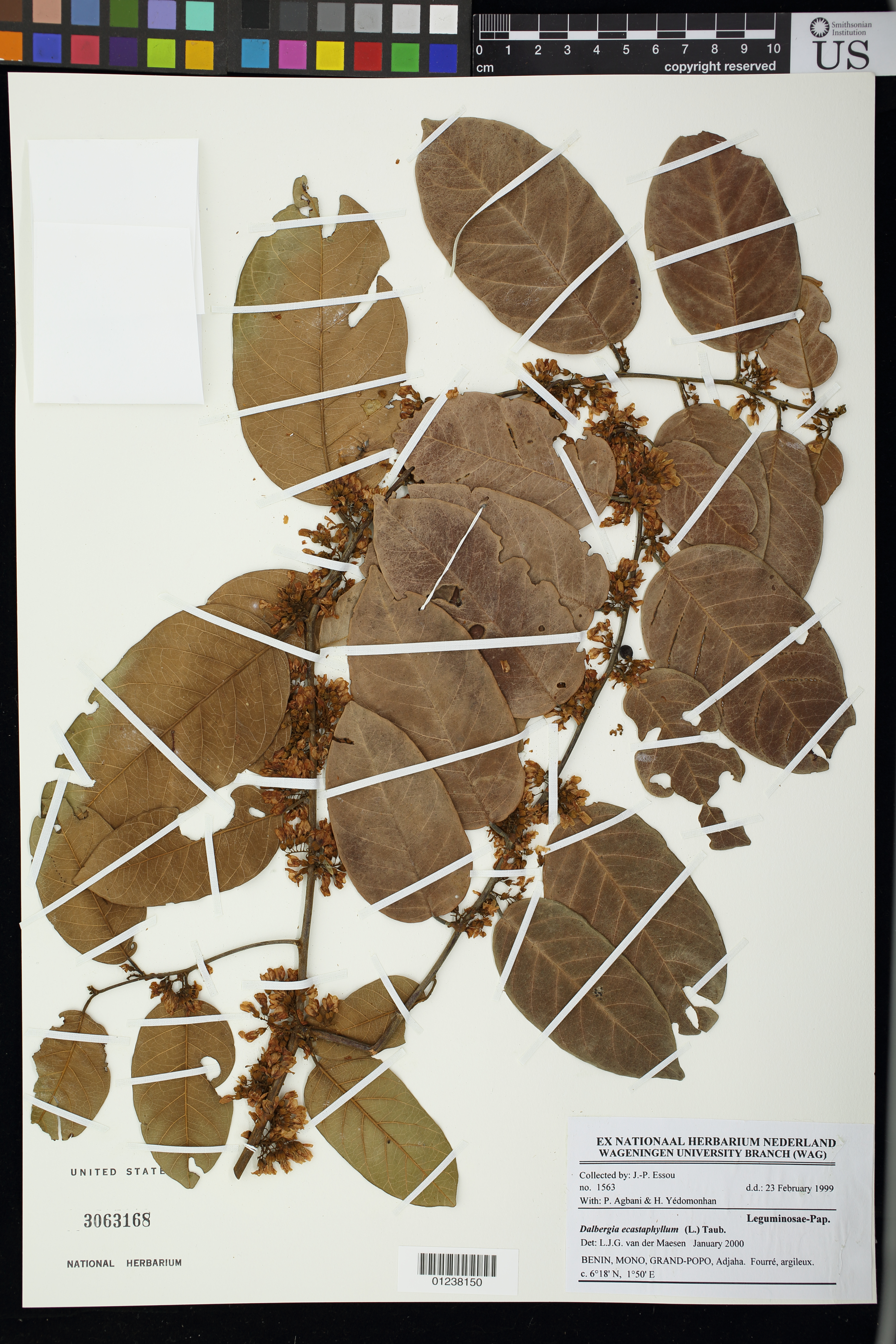 Dalbergia ecastaphyllum (L.) Taub. Object Details Biogeographical Region 22 - West Tropical Africa Collector J. -. Essou Record Last Modified 2 Nov 2017 Specimen Count 1 Collection Date 23 Feb 1999 Barcode 01238150 USNM Number 3063168 Place Grand-Popo, Adjaha., Mono, Benin, Africa Published Name Dalbergia ecastaphyllum (L.) Taub. Taxonomy Plantae Dicotyledonae Rosales Fabaceae Faboideae NMNH - Botany Dept. Record ID nmnhbotany_11276469 Usage of Metadata (Object Detail Text) CC0 GUID (Link to Original Record)